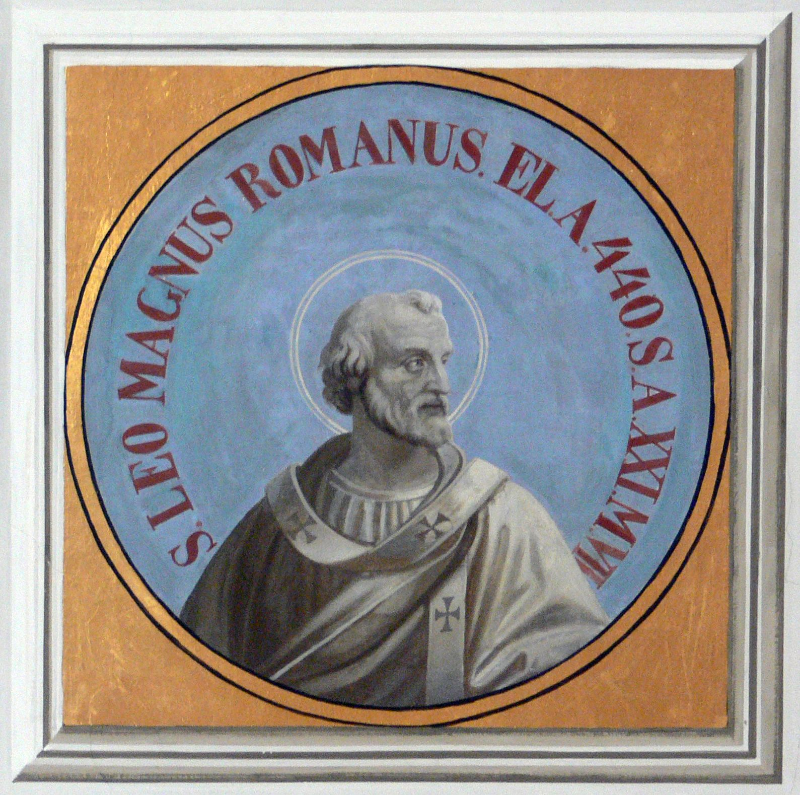 Kath. Pfarrkirche St. Gordian und Epimachus, Merazhofen, Stadt Leutkirch im Allgäu, Landkreis Ravensburg Max Bentele: Hauptdeckengemälde, Ecke: Papst Leo der Große